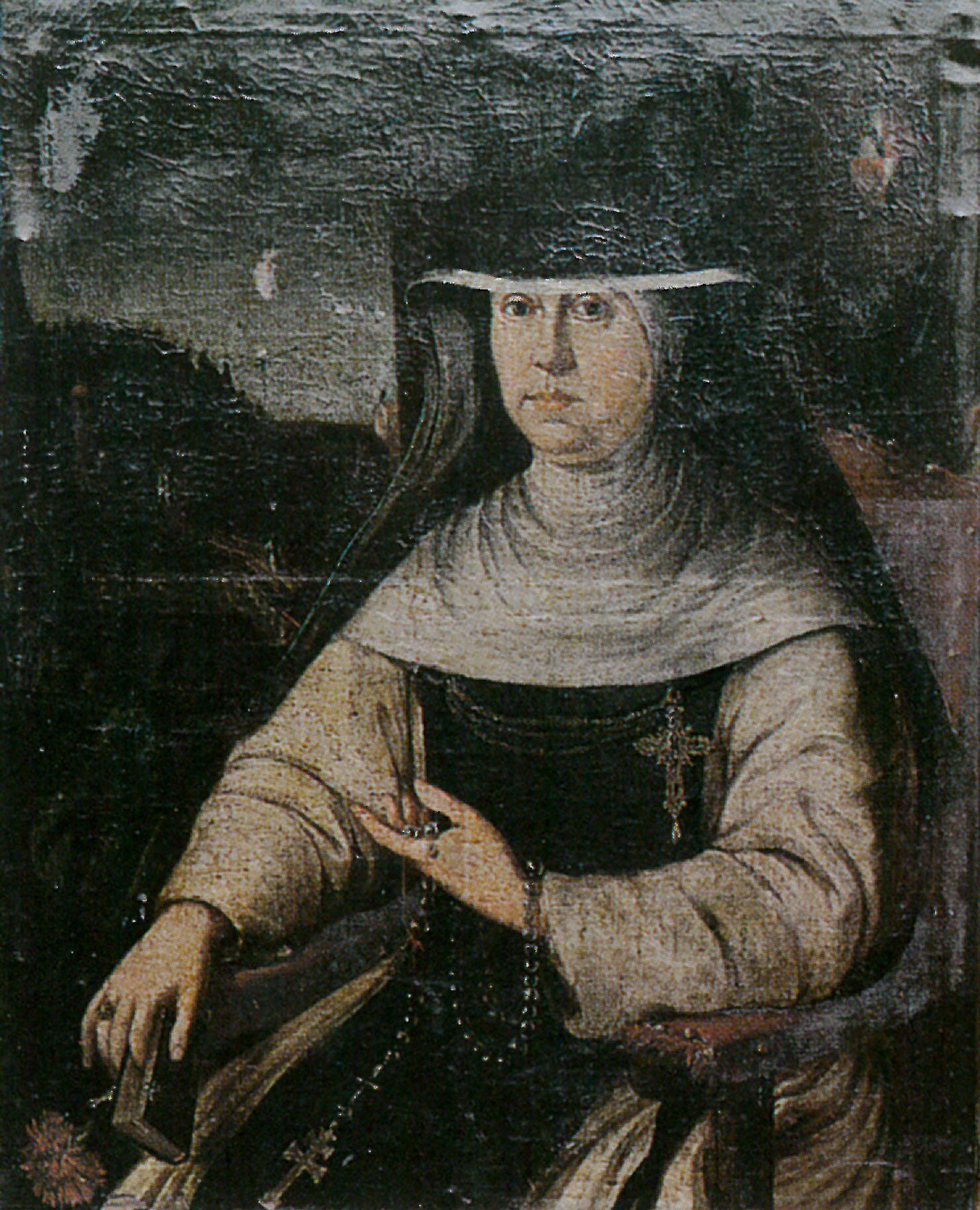 Maria Anna Thanner, Äbtissin der Reichsabtei Baindt 1688–1721